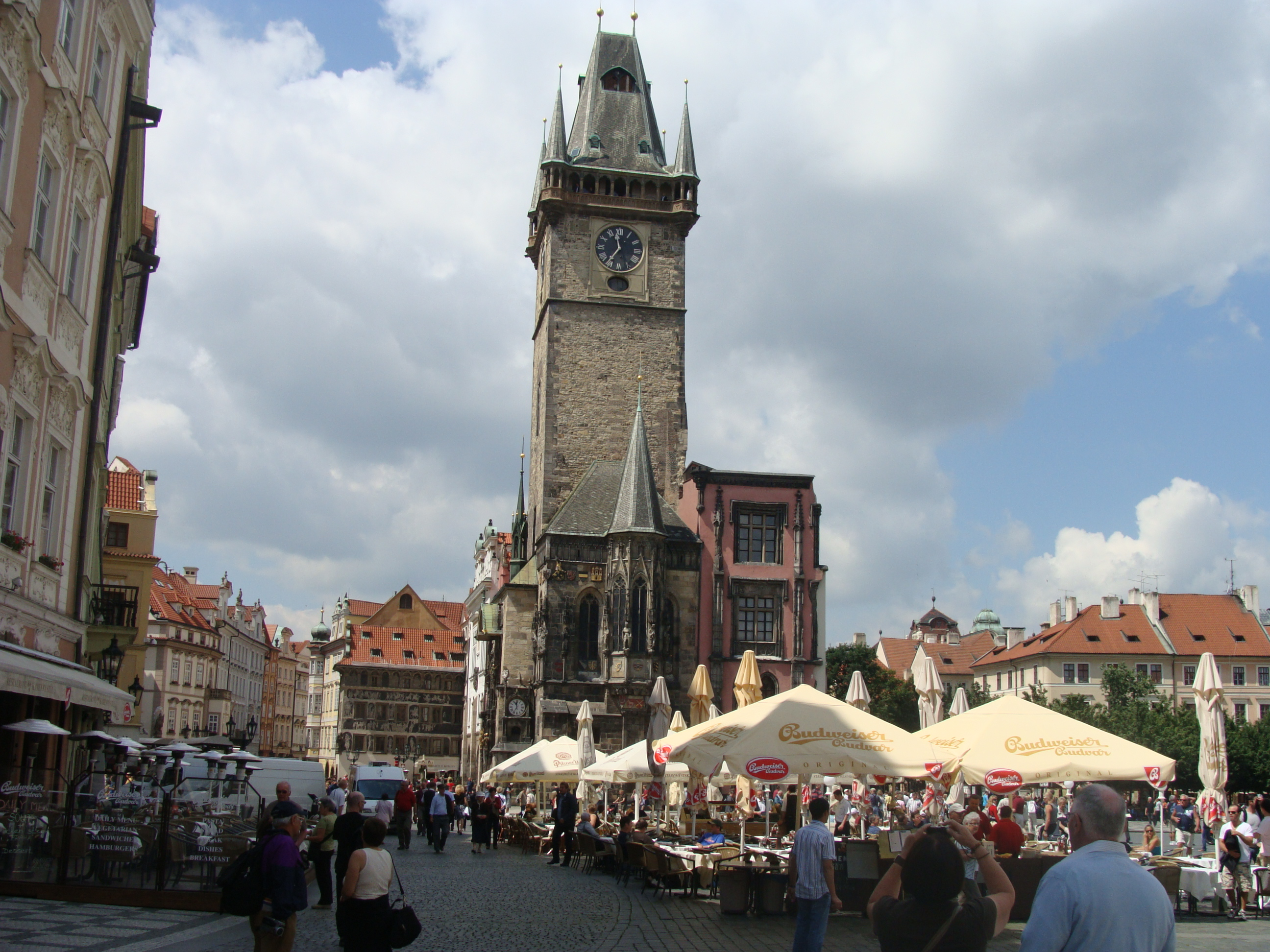 Prag Besuch am 18.06.09